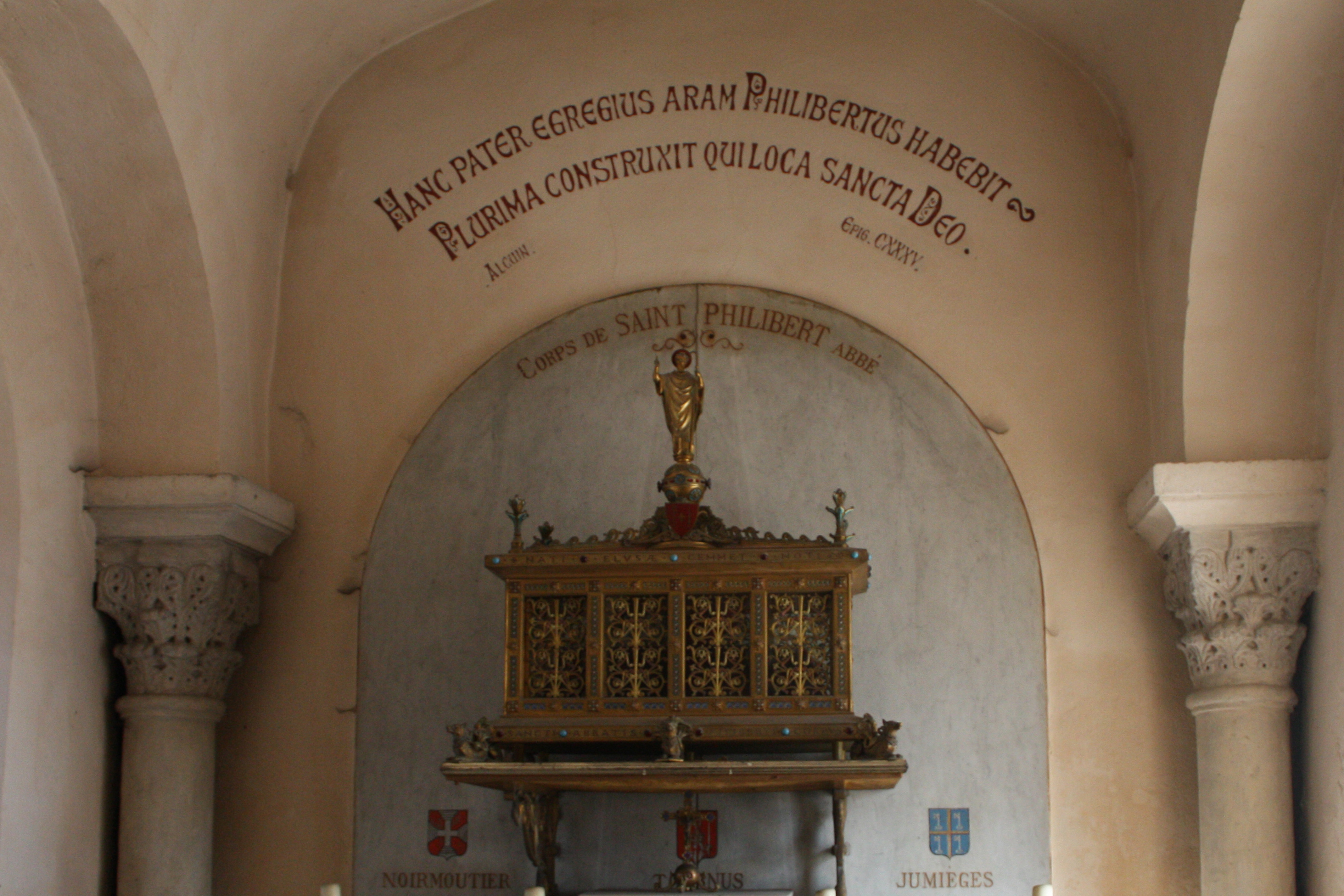 Reliquaire de St Philibert.